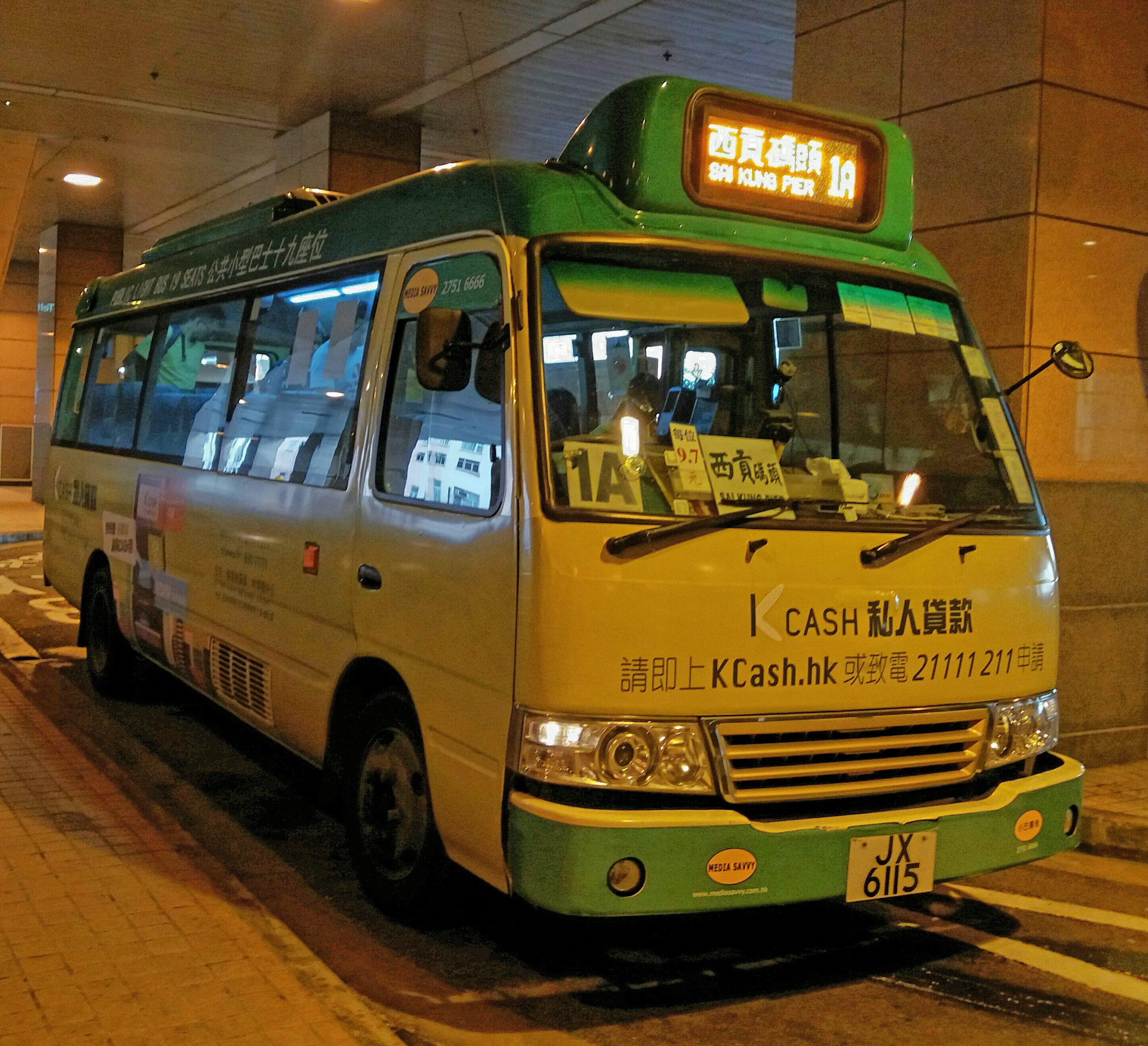 中文（香港）: 新界區專線小巴1號線，剛到達九龍灣站總站